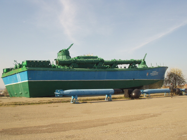 г.Темрюк. Военный катер времён Великой Отечественной войны в музее "Военная горка"